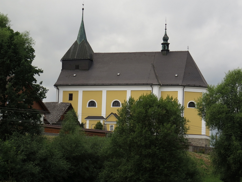 Kostel Nejsvětější Trojice, v obci, Sádek (okres Svitavy).